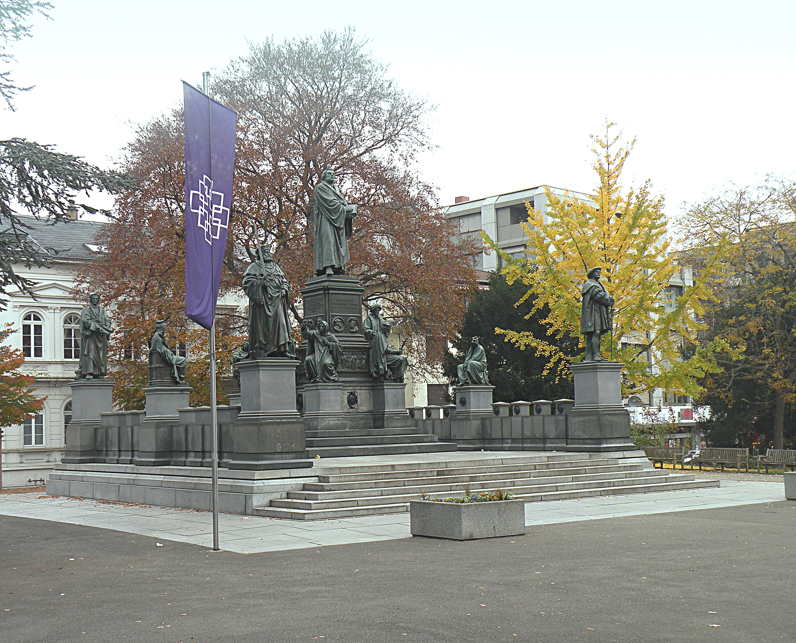 Lutherdenkmal (Worms)